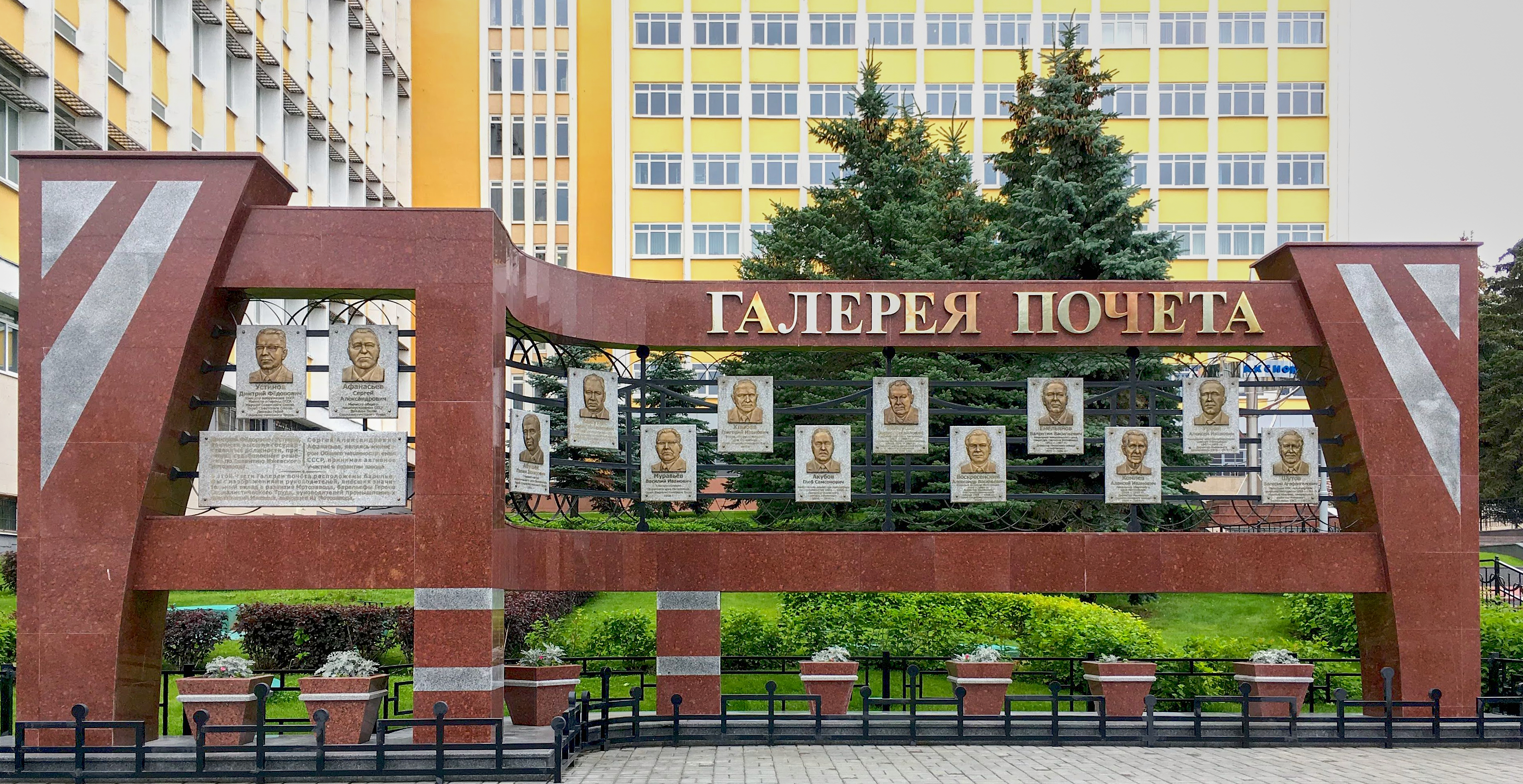 Доска почёта у входа в здание администрации Аксион-Холдинга в Ижевске